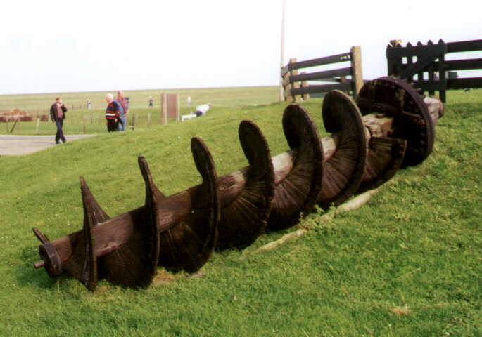 Houten molenvijzel